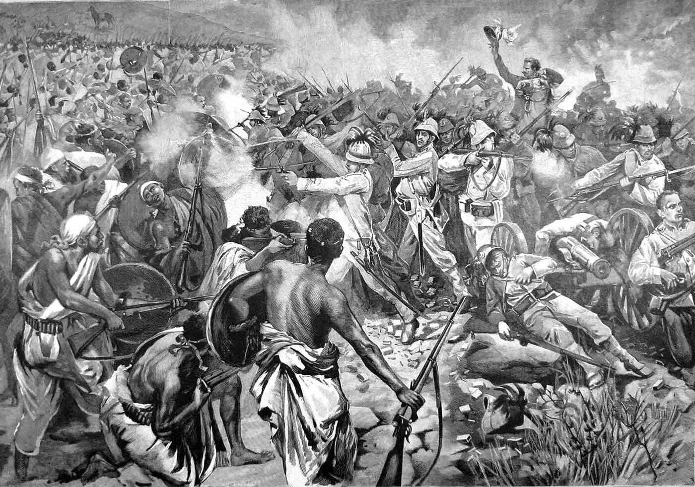 Bataille d'Adoua, 1896. Gravure d'époque.